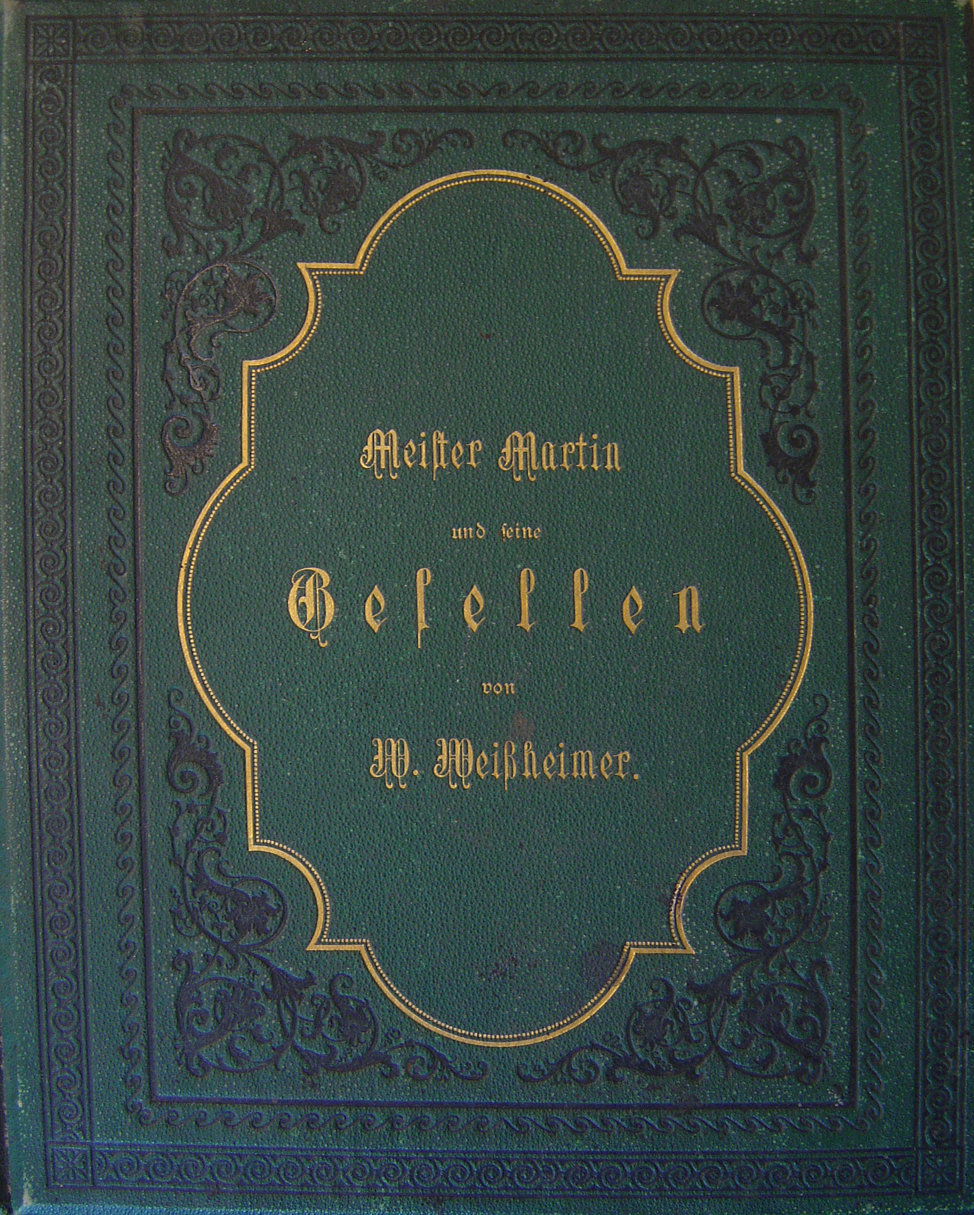 Opernpartitur von Wendelin Weißheimers berühmter Oper "Meister Martin und seine Gesellen"